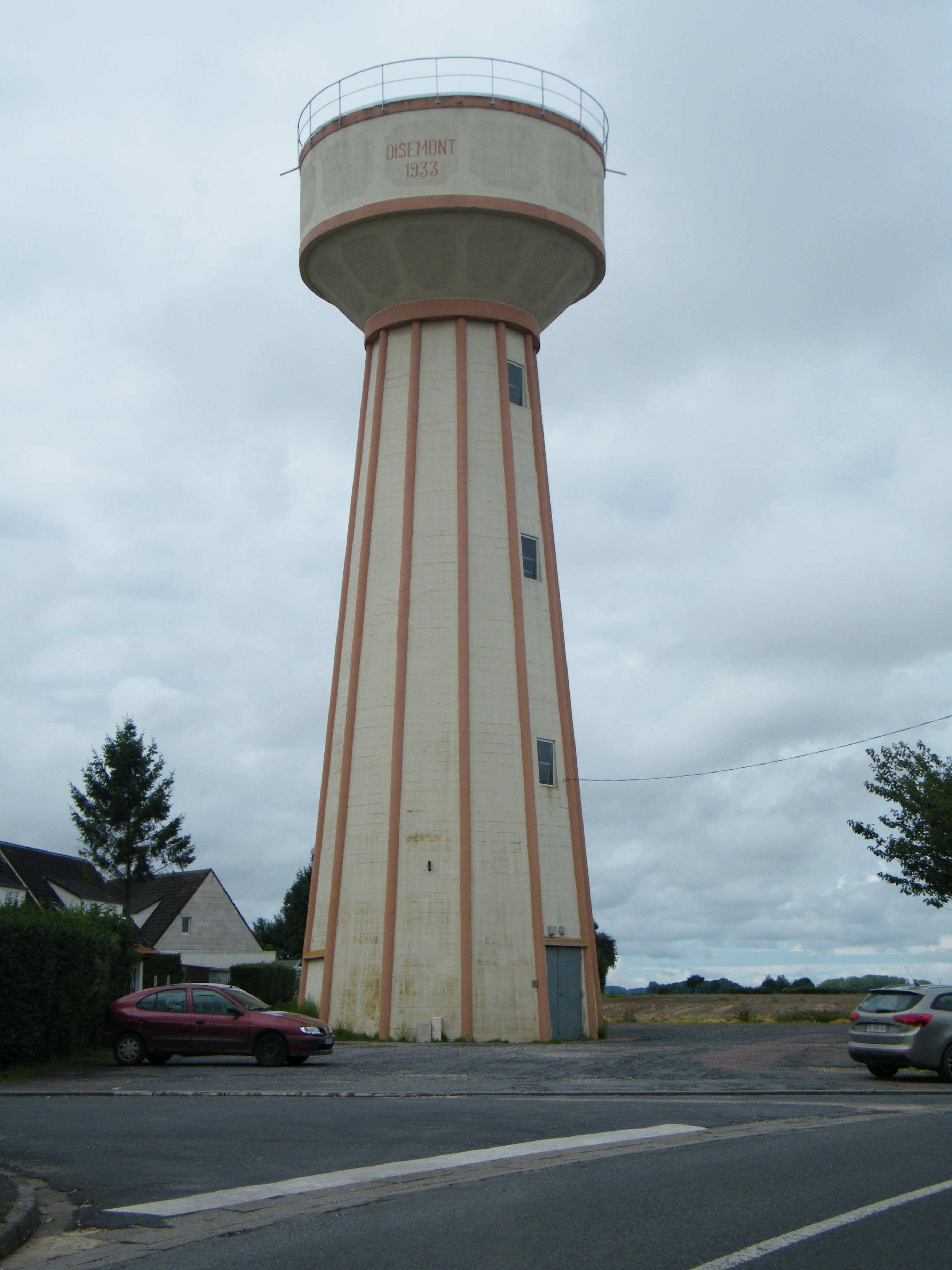 Oisemont, Somme, Fr, château d'eau de 1933.